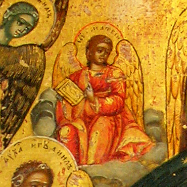 Ікона з Веткаўскага музея